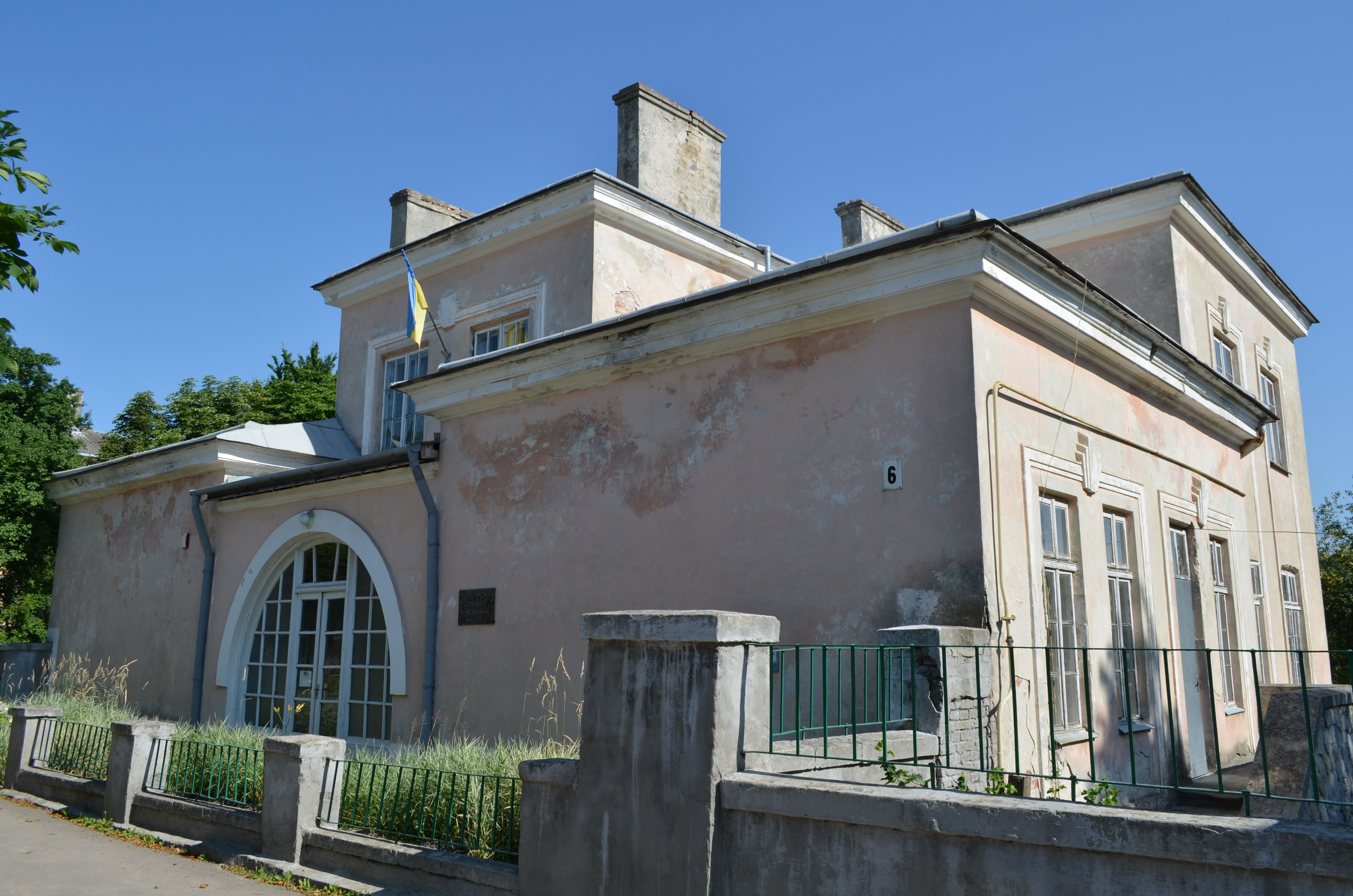 Житловий будинок (мур.), Перемишляни, вул. Привокзальна,6